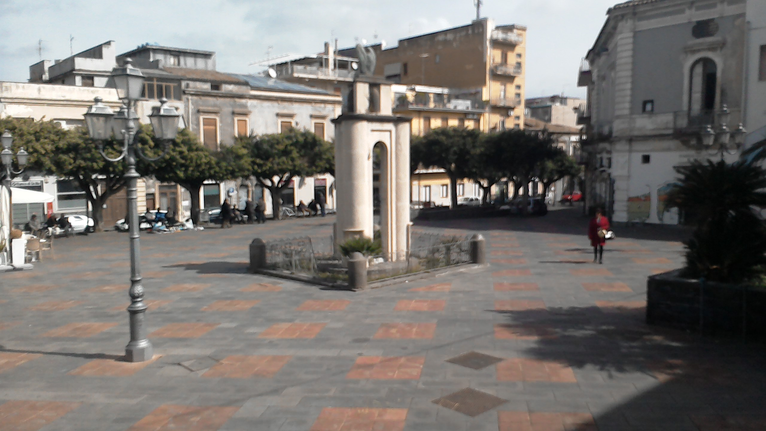 Misterbianco - piazza Giuseppe Mazzini con al centro, il monumento ai cittadini caduti in tempo di guerra.